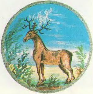 Беларуская (тарашкевіца): Герб Цырына (Cyryn)